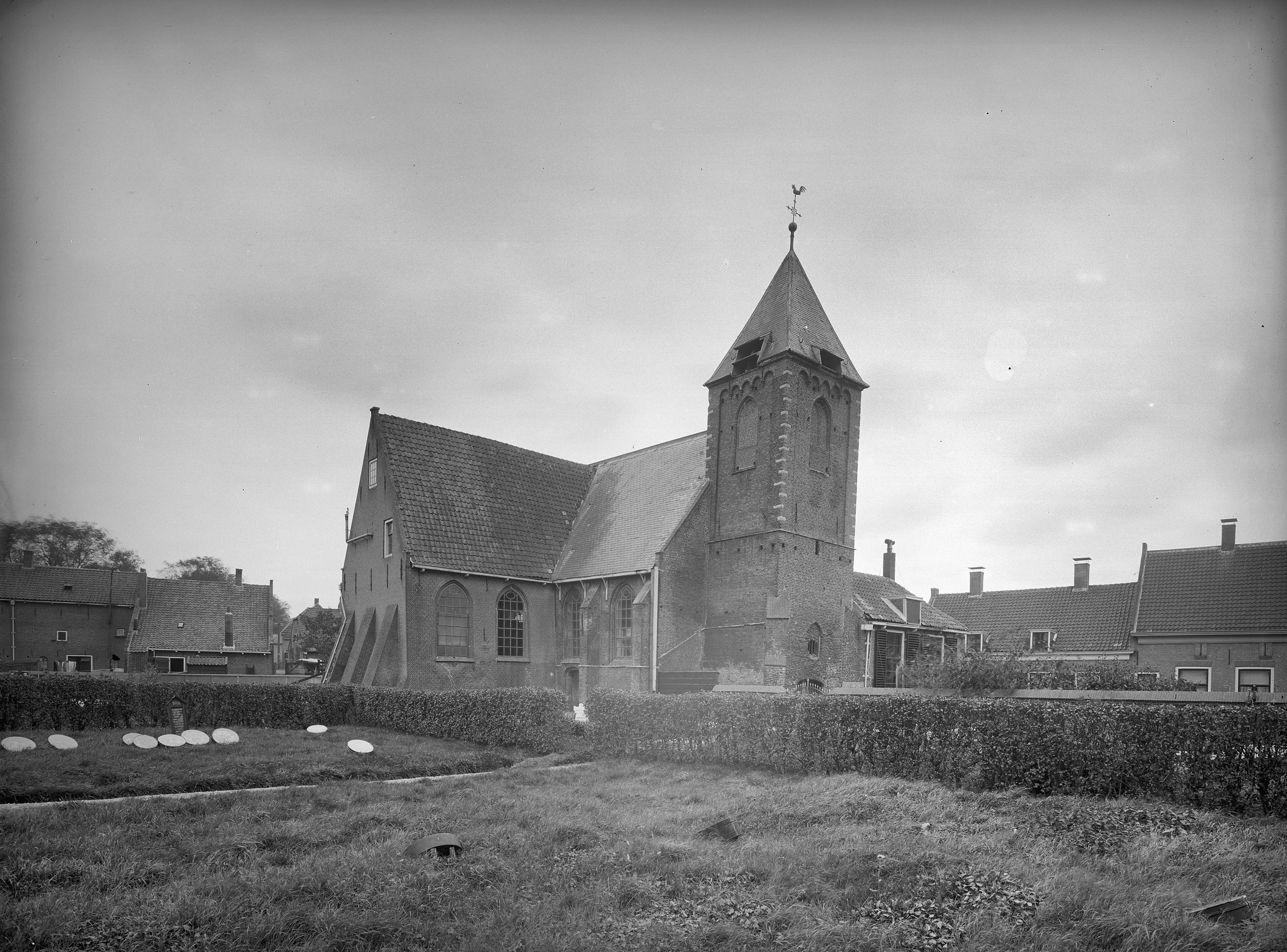 Nederlands Hervormde Kerk: kerk naar het zuid-oosten (opmerking: Fotonummer 10120)